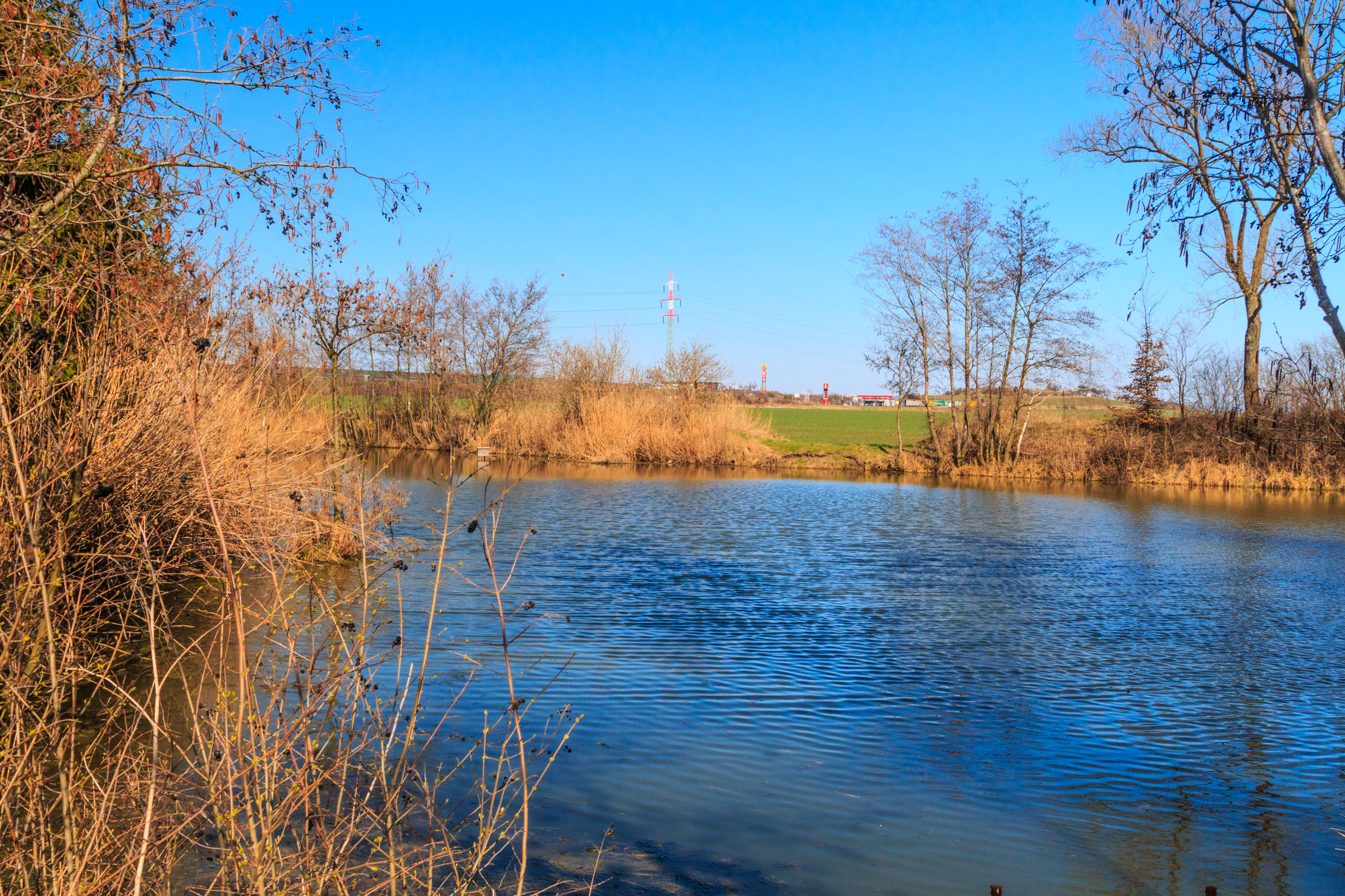 Rybníček pod Osicemi v okrese Hradec Králové Project: Vodstvo.